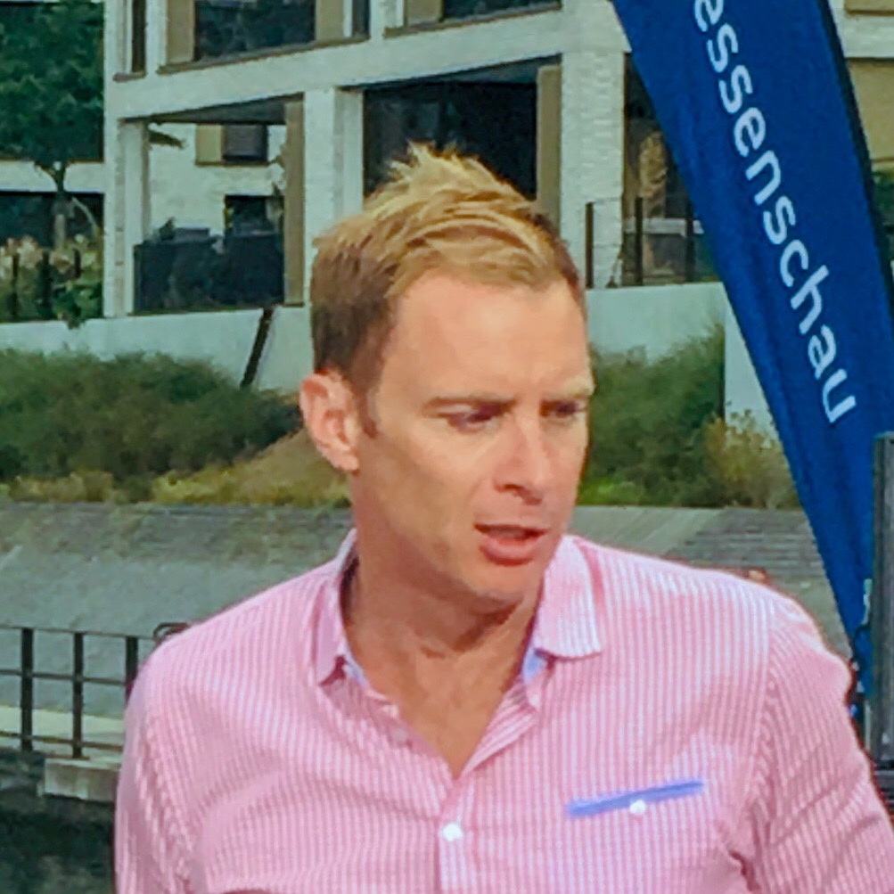 Jens Kölker bei Hessenschau on Tour an der Hafentreppe in Offenbach am Main